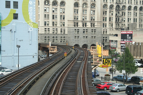 Photo de la Chicane de Harrison Street